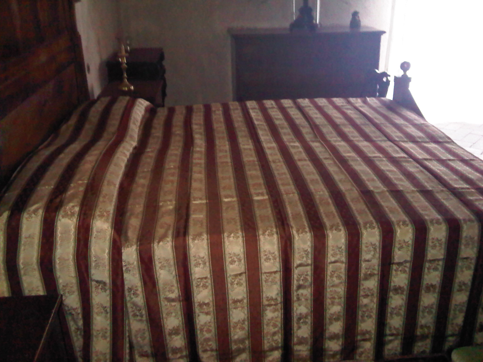 Letto su cui, il 26 settembre 1897, venne alla luce Giovanni Battista Montini.